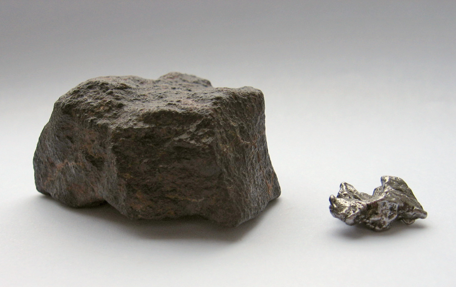 Steinmeteorit (aus Marokko, leider keine weiteren Deteils bekannt) und Eisenmeteorit (Campo del Cielo meteorit, found 1576, Gran Chaco Gualamba, Chaco, Argentinien - Alter: 4000 bis 6000 Jahre); der Eisenmeteorit ist ca. 1,5 cm breit